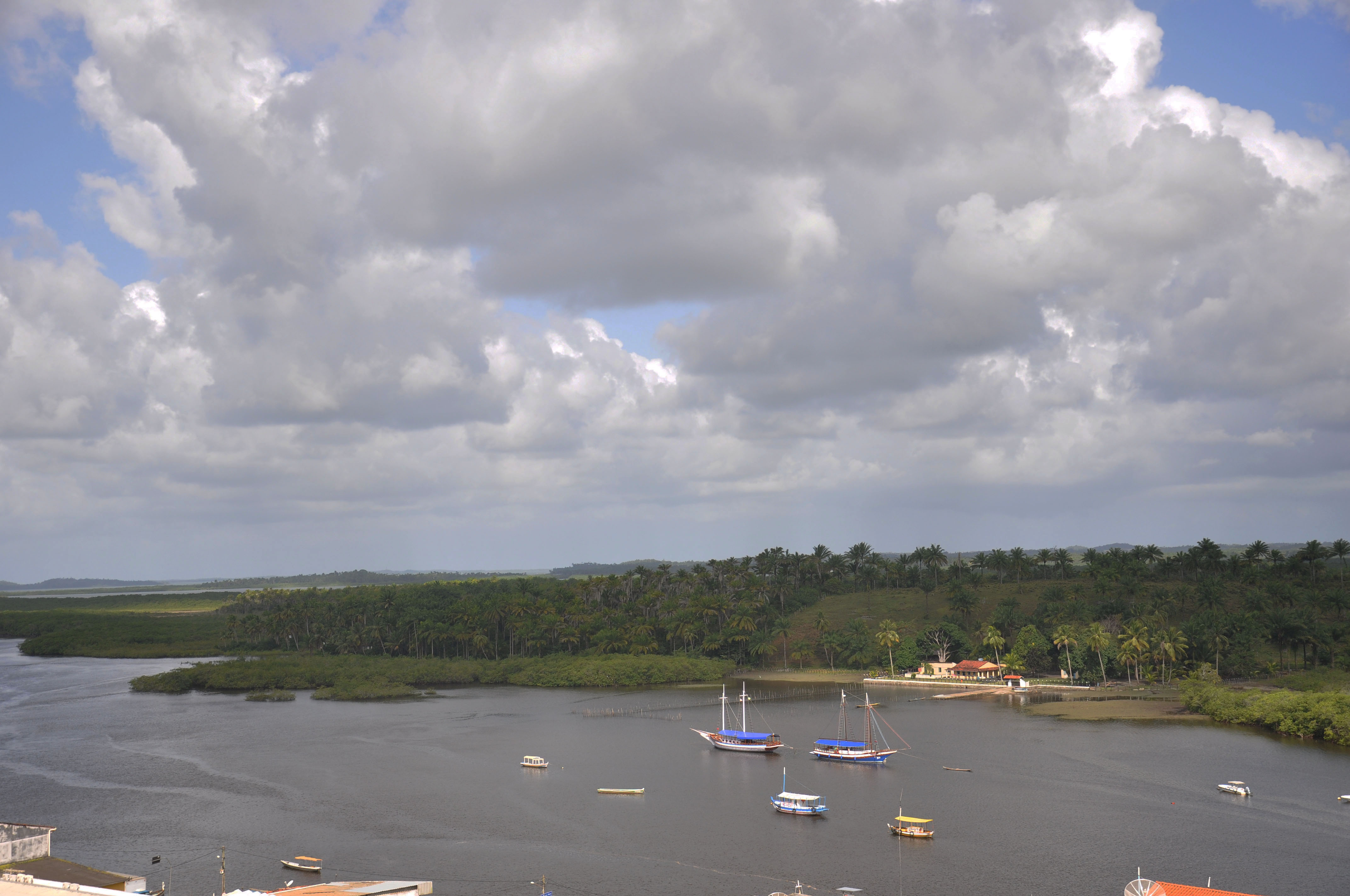 Camamu - Saída para a Baía de Camamu- Foto - Tereza Torres/ Setur